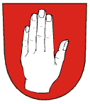 Znak obce Domašov nad Bystřicí